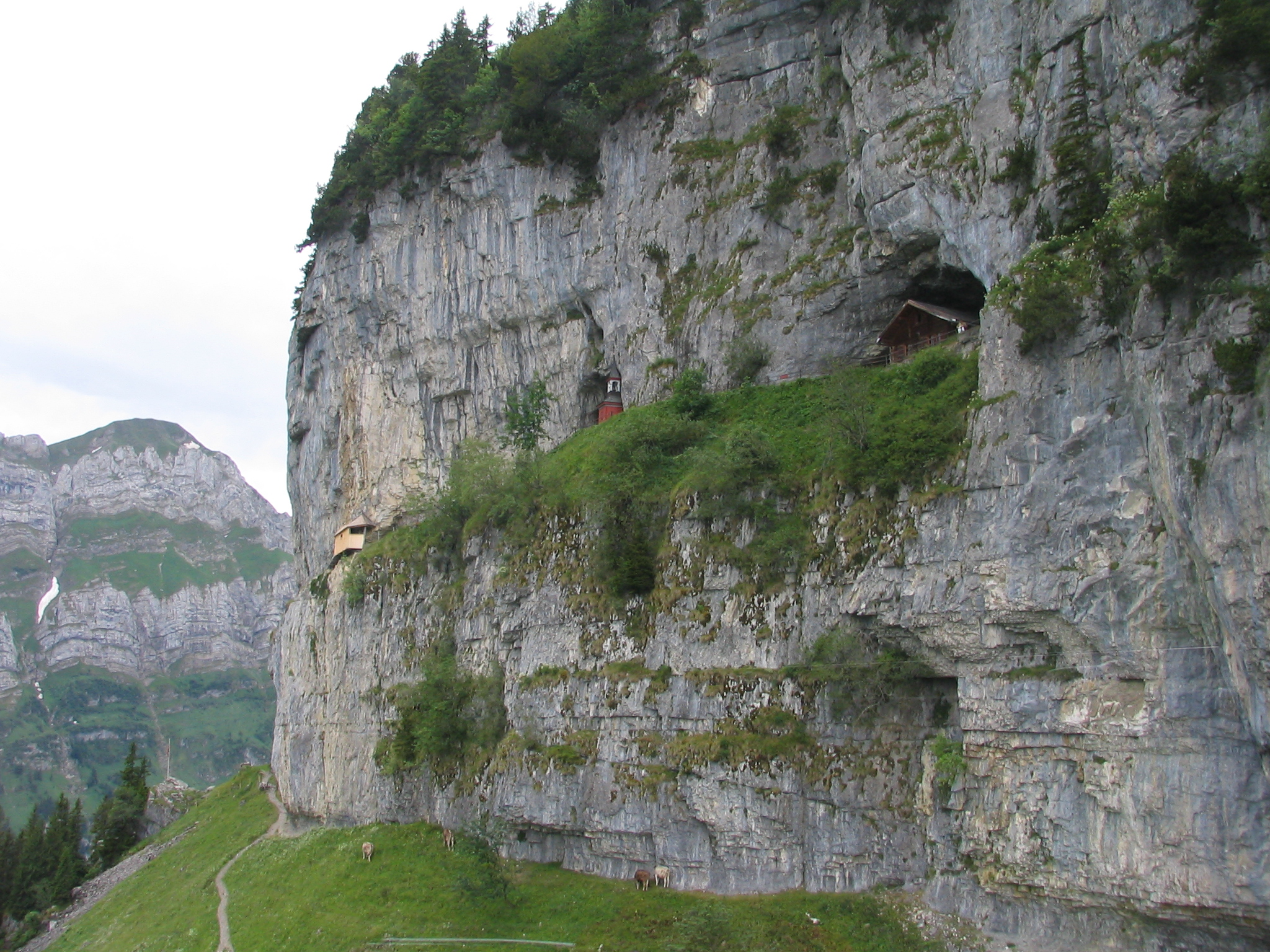 Wildkirchli, Appenzell, Schweiz. Bild aufgenommen aus der Seilbahn Wasserauen-Ebenalp. Aufgenommen 29.6.2006 von Hadi